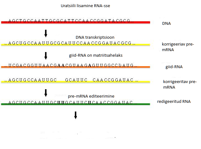 RNA korrigeerimisel kasutatakse gRNA-d matriitsina A-aluste vastu U-lämmastikaluste lisamisel mRNA tühikutesse.